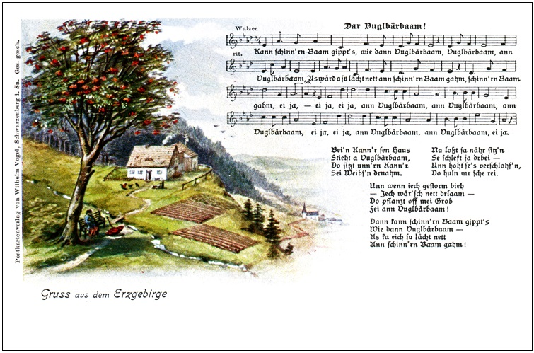 "Dar Vuglbärbaam", Text Max Schreyer (1845-1922), Graphik Paul Hermann Preiß, Kunstverlag Wilhelm Vogel, Schwarzenberg in Sachsen, Liedpostkarte Nr. 1